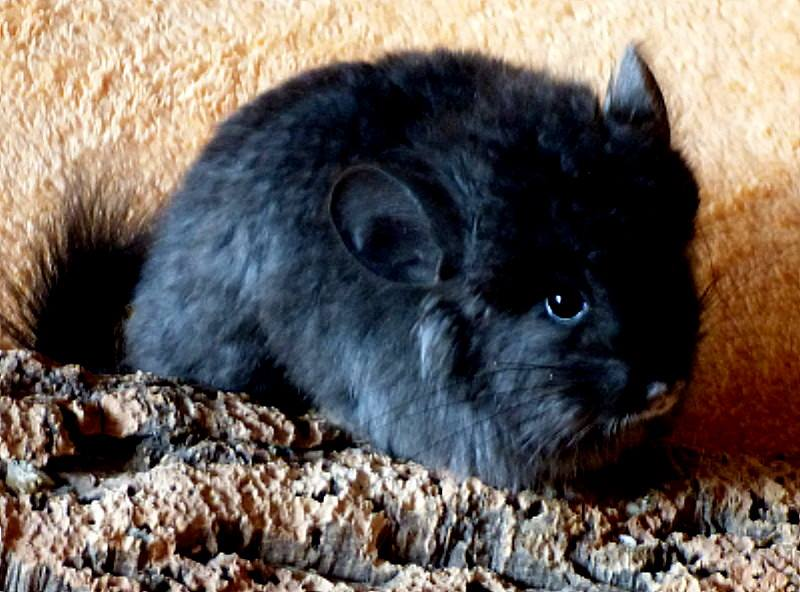 RPA Angora Ebony dark - von Petra Klostereit